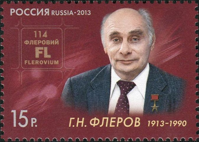 100 лет со дня рождения Г.Н.Флерова (1913-1990), физика-ядерщика. Портрет Флёрова и 114-й элемент таблицы Менделеева, названный в честь Флёрова. Дизайнер — А. Поварихин, тираж — 450 тыс. экз.